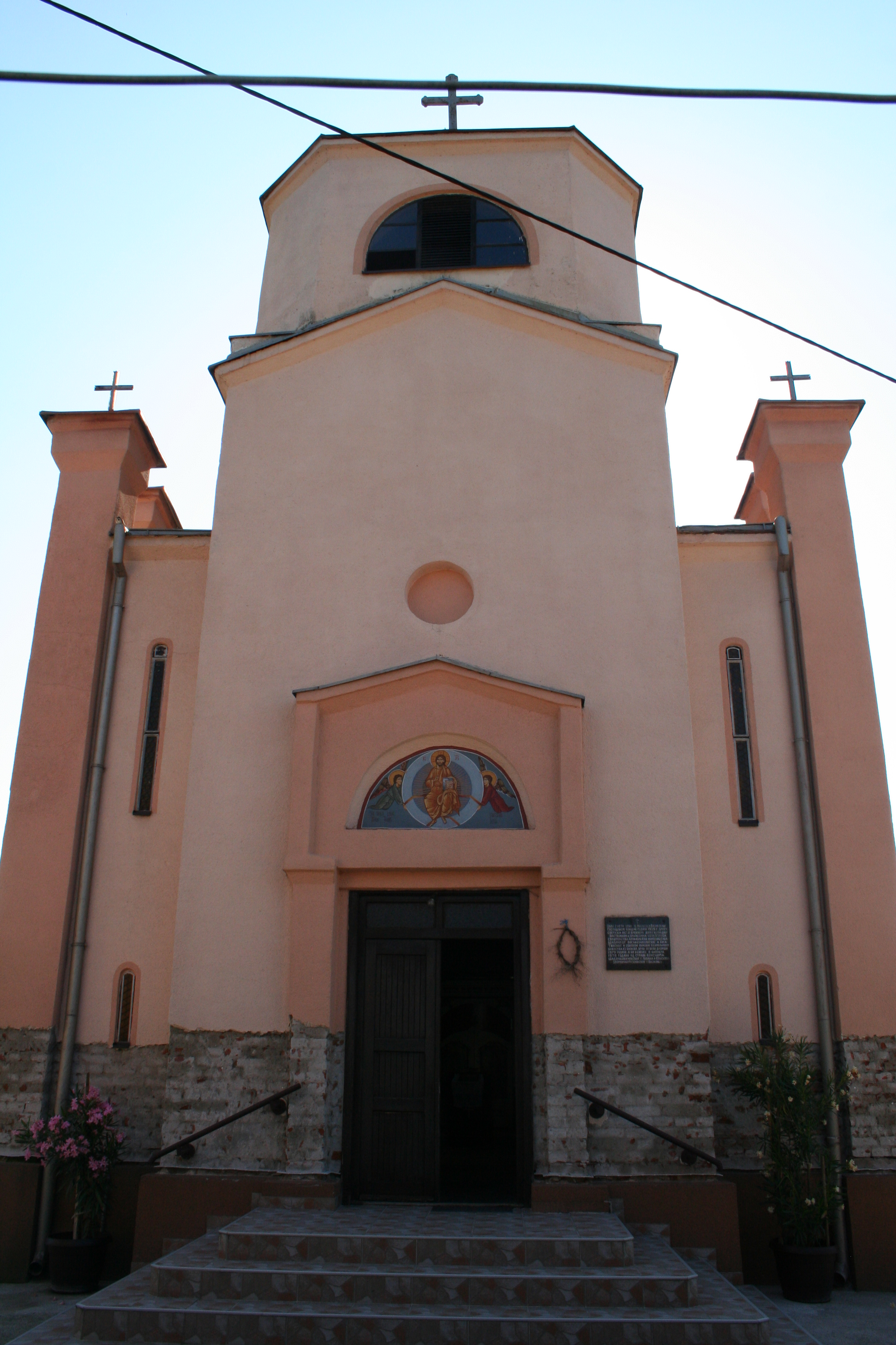 Crkva Vaznesenja Gospodnjeg, Uzveće